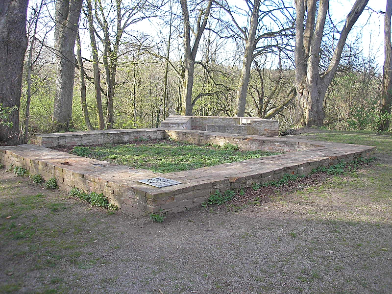 Burg Zusameck über Dinkelscherben (Landkreis Augsburg, Bayerisch-Schwaben). Das Plateau der Kernburg nach Nordwesten. Eigene Aufnahme, April 2008 / Zusameck castle (Dinkelscherben, Bavaria, Germany). Central castle, looking north west. Own photo, April 2008